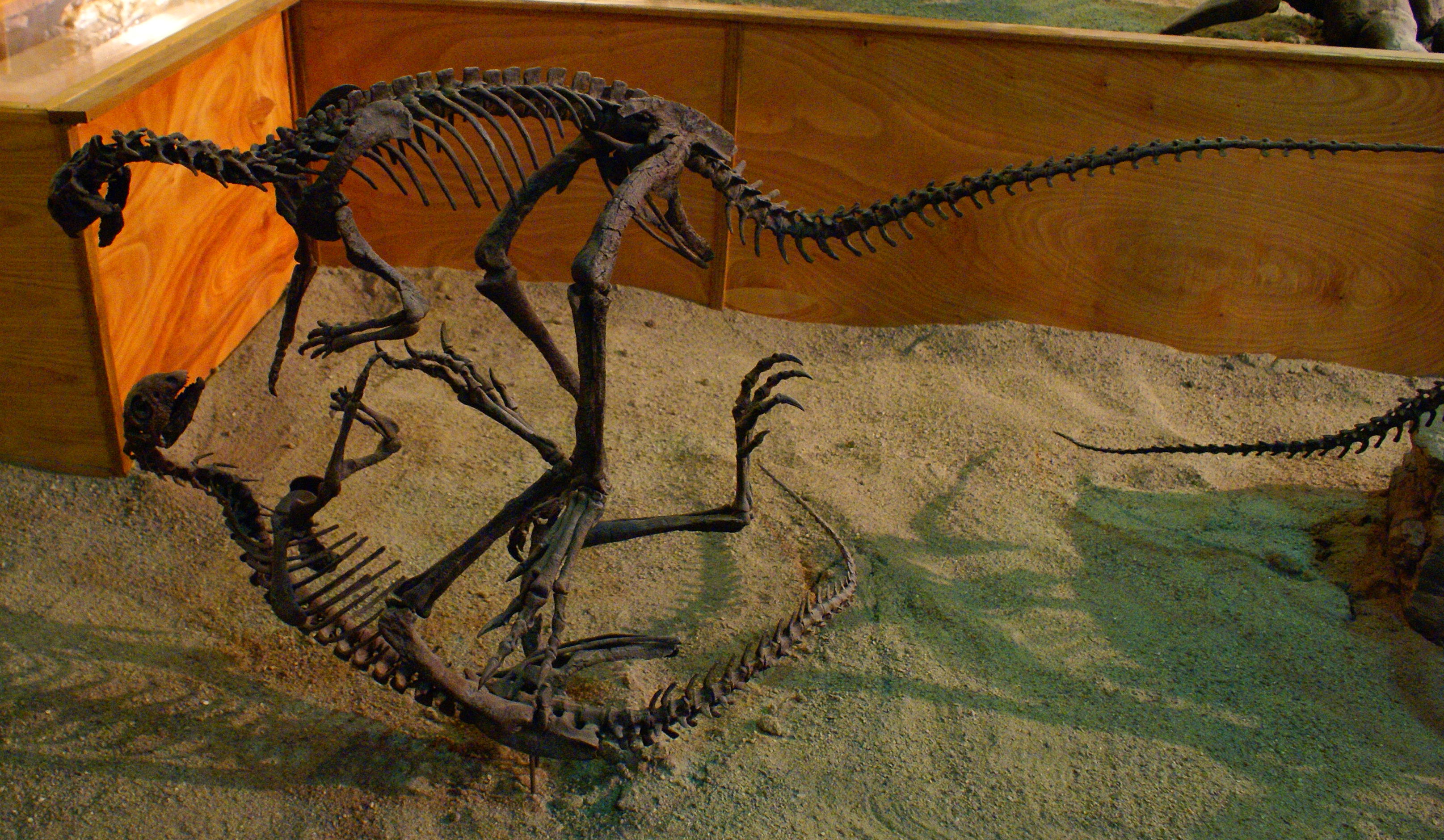 Othnielosaurus, Wyoming Dinosaur Center